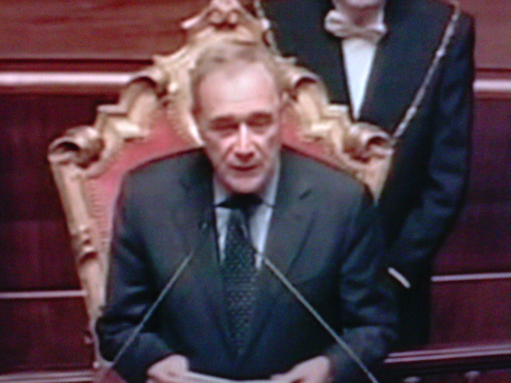 Discorso d'insediamento del Presidente del Senato Pietro Grasso